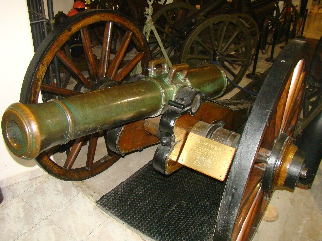 Cañon N° 4 1814 (Museo de Armas de la Nación)